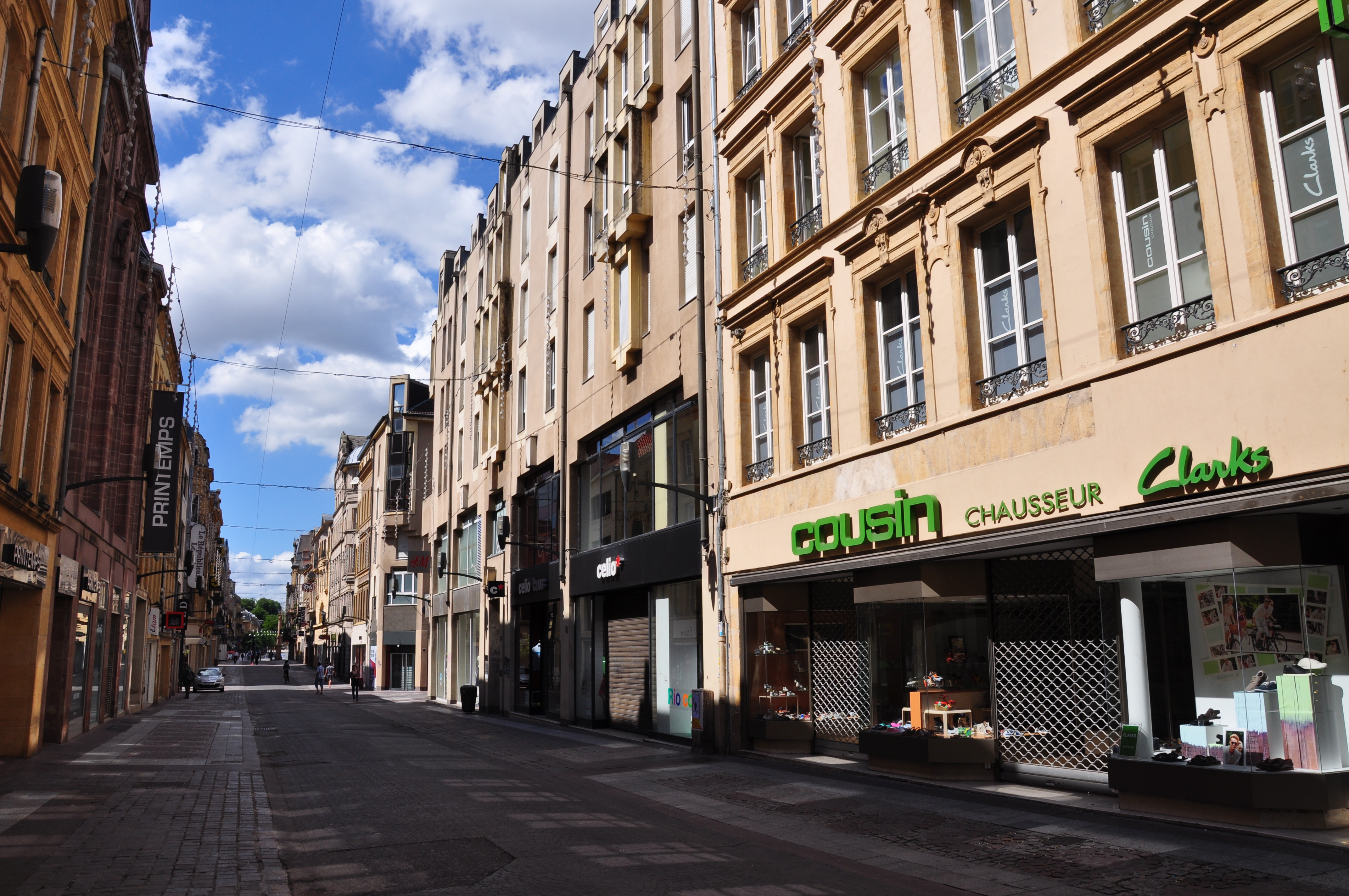 Rue Serpenoise à Metz, Département de la Moselle en Lorraine